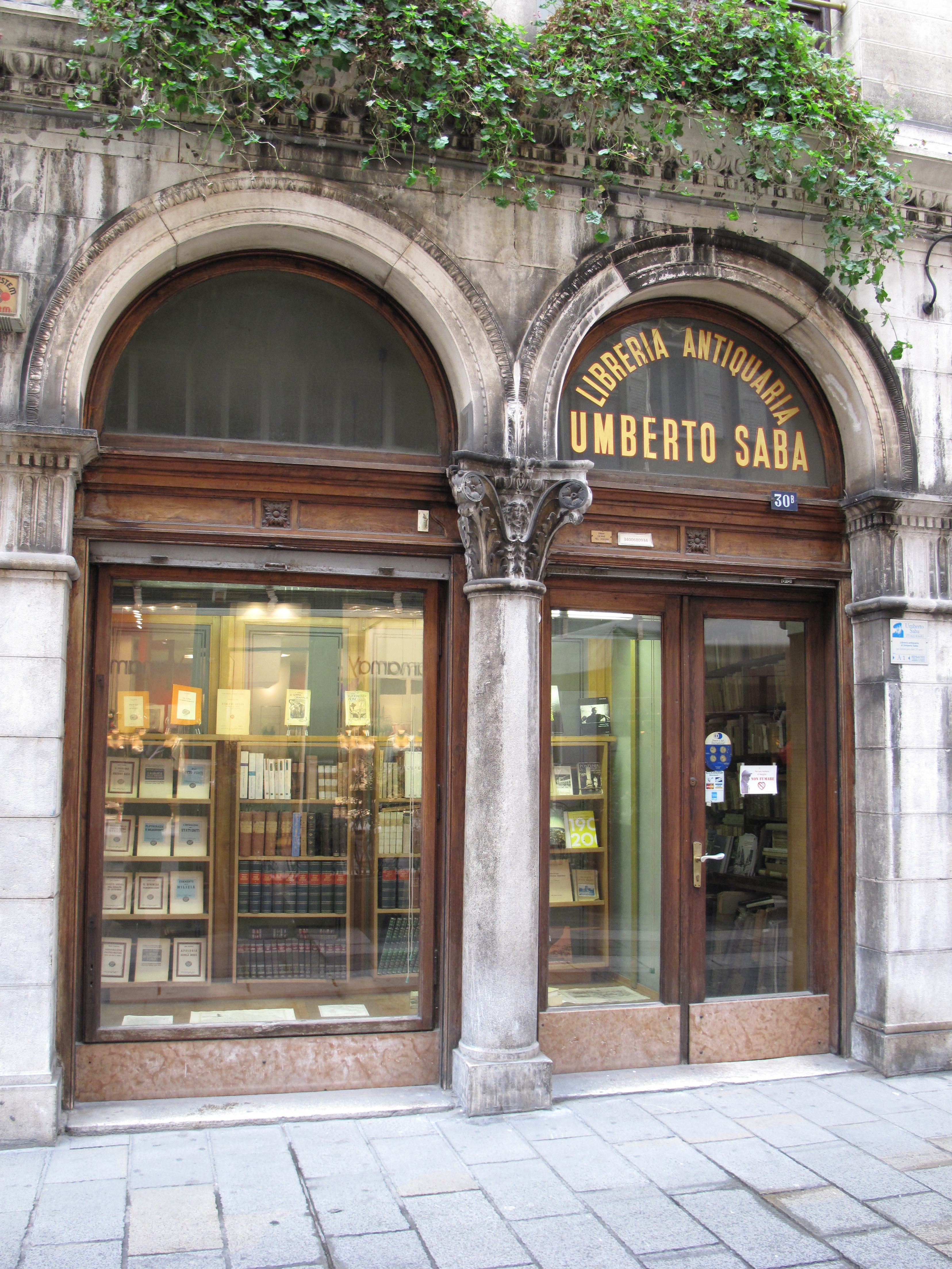 Libreria Antiquaria Umberto Saba di Trieste, Italia